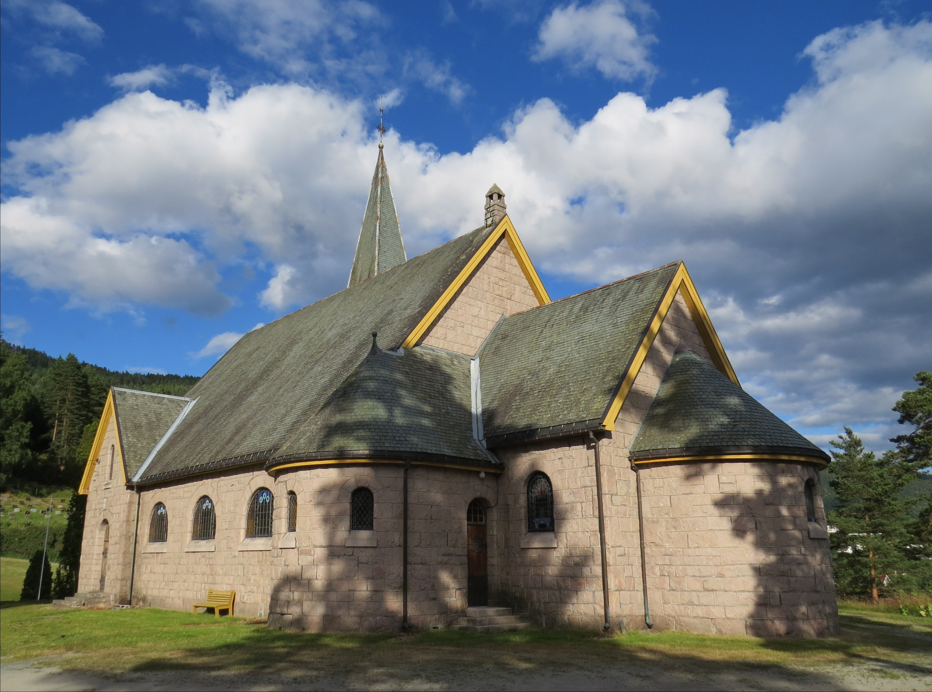 Kviteseid nye Kirke, Telemarken